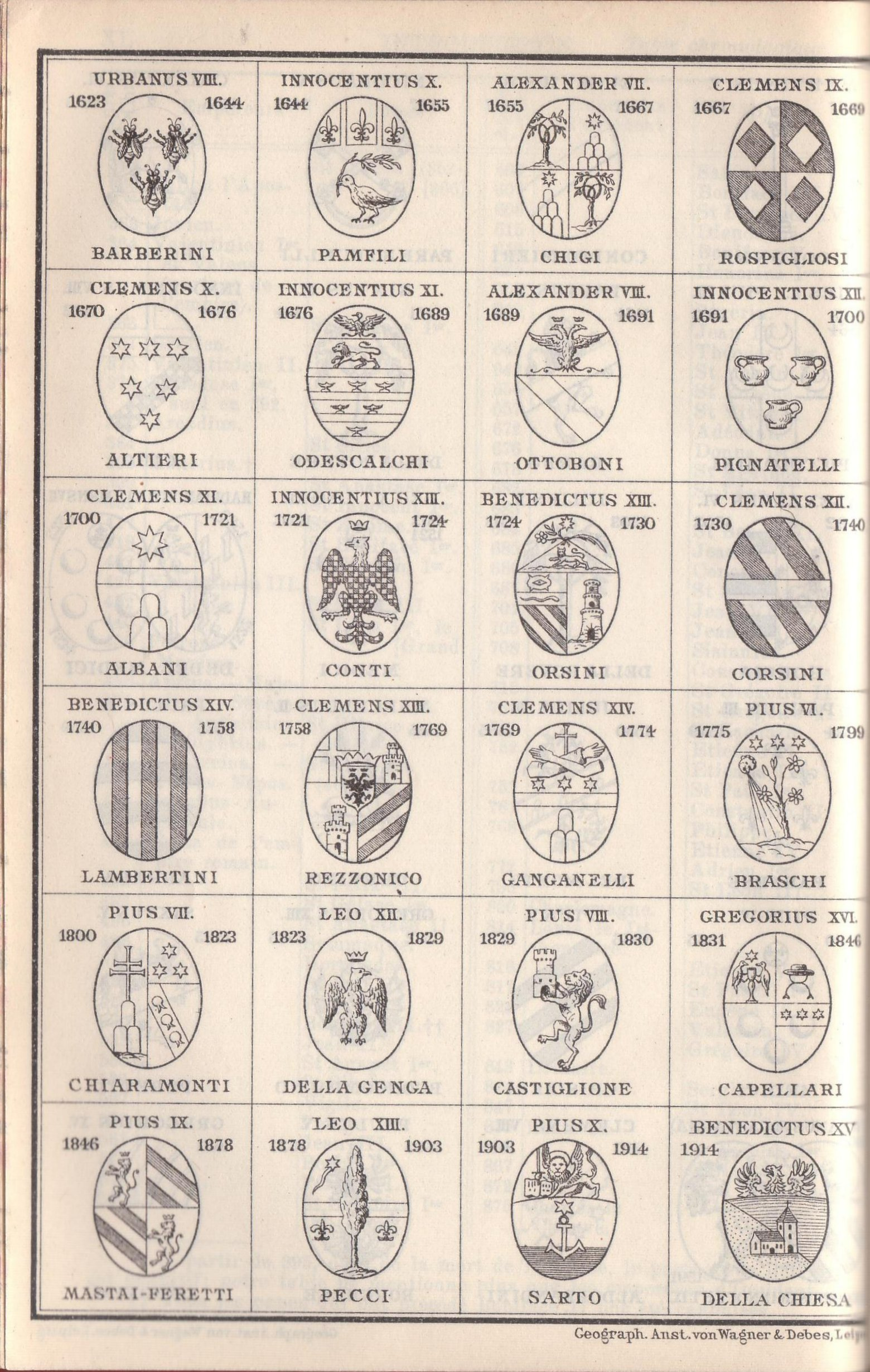 Wappentafel der Päpste aus Italie central, 14., 1909